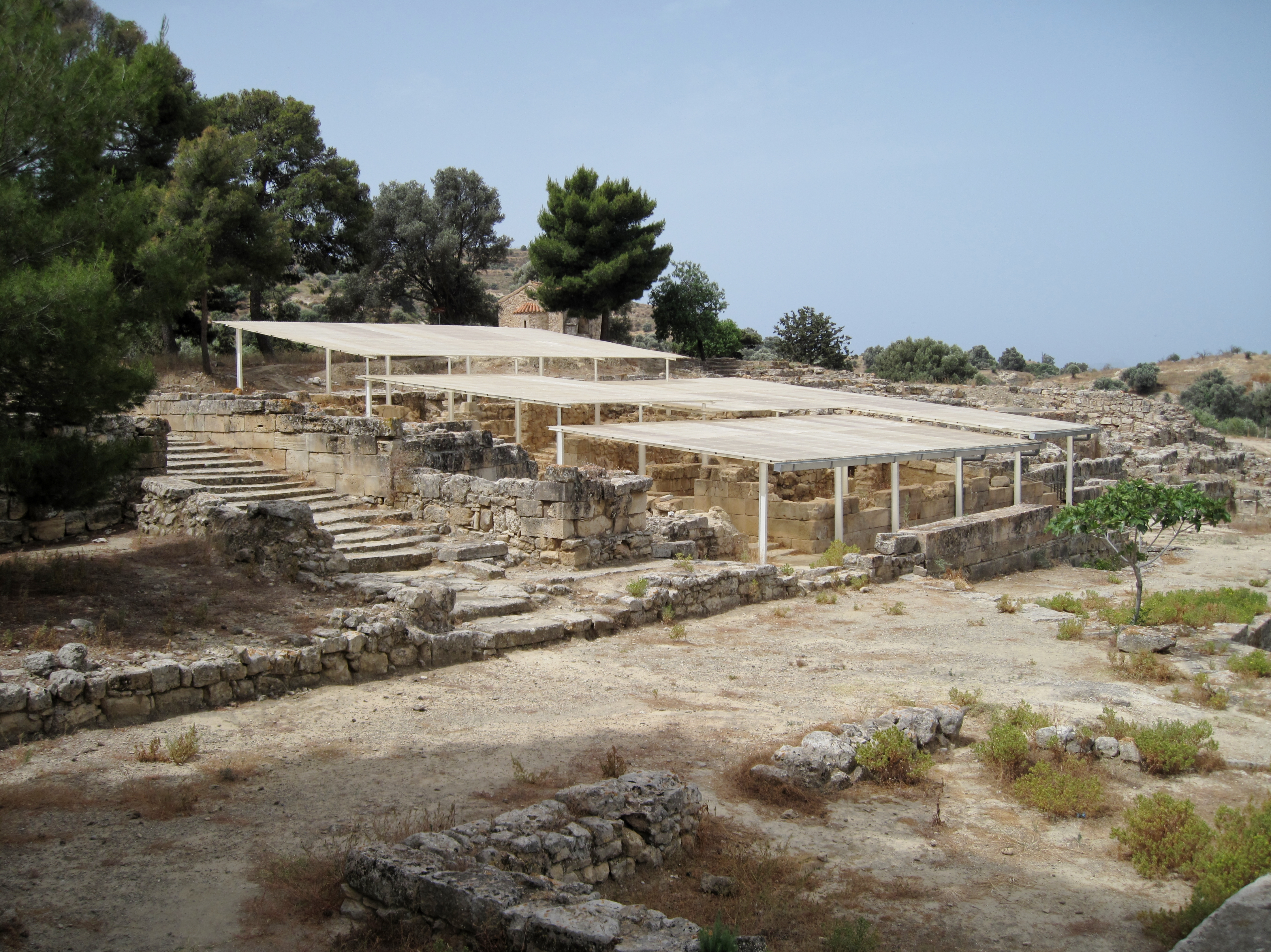 Ausgrabungsstätte von Agia Triada in der Gemeinde Festos, Regionalbezirk Iraklio, Kreta, Griechenland